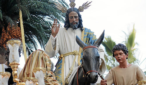 borriquita de huelva